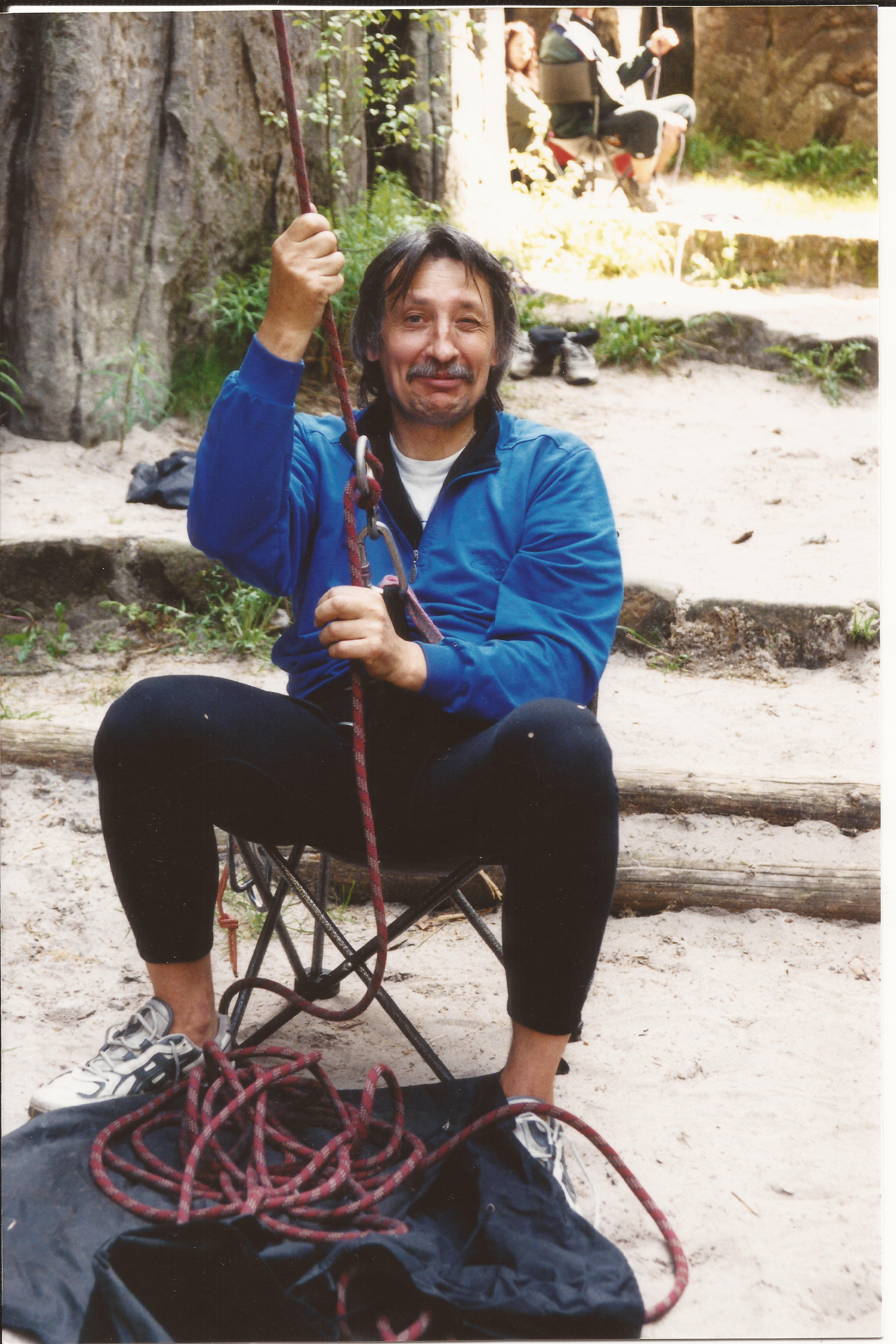 foto1